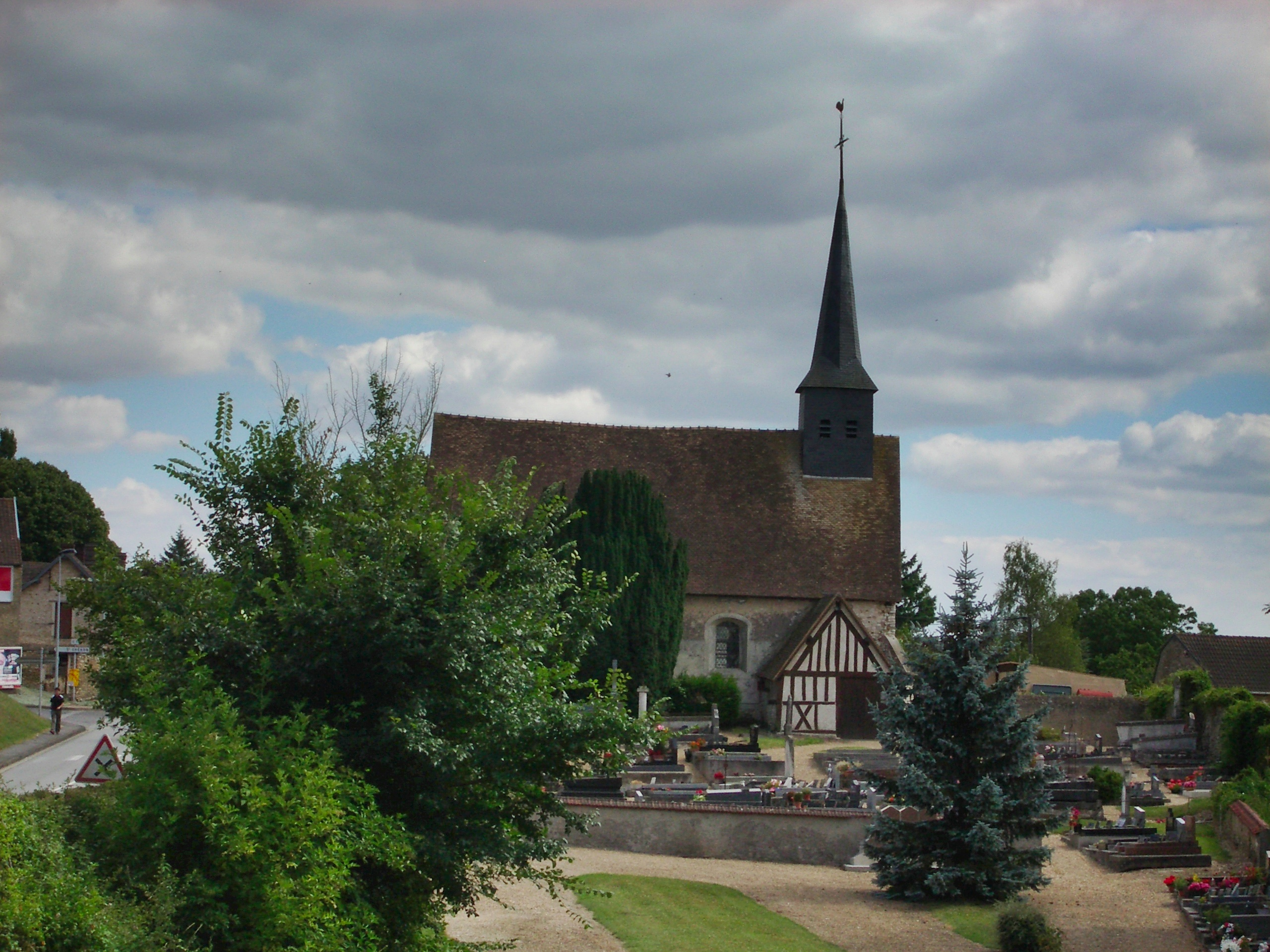 Eglise d'Hécourt (Eure)